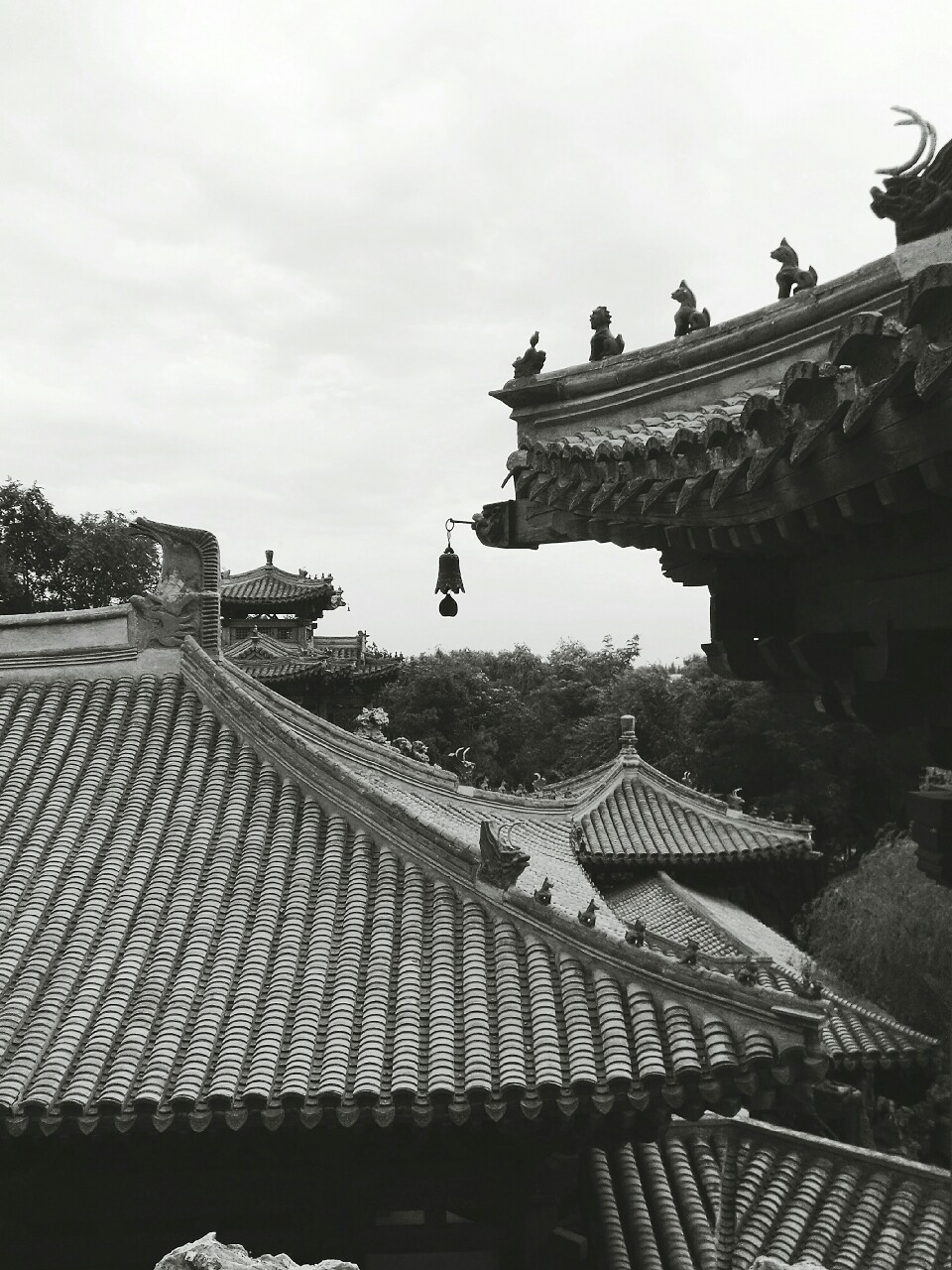 Chinese gardens in China